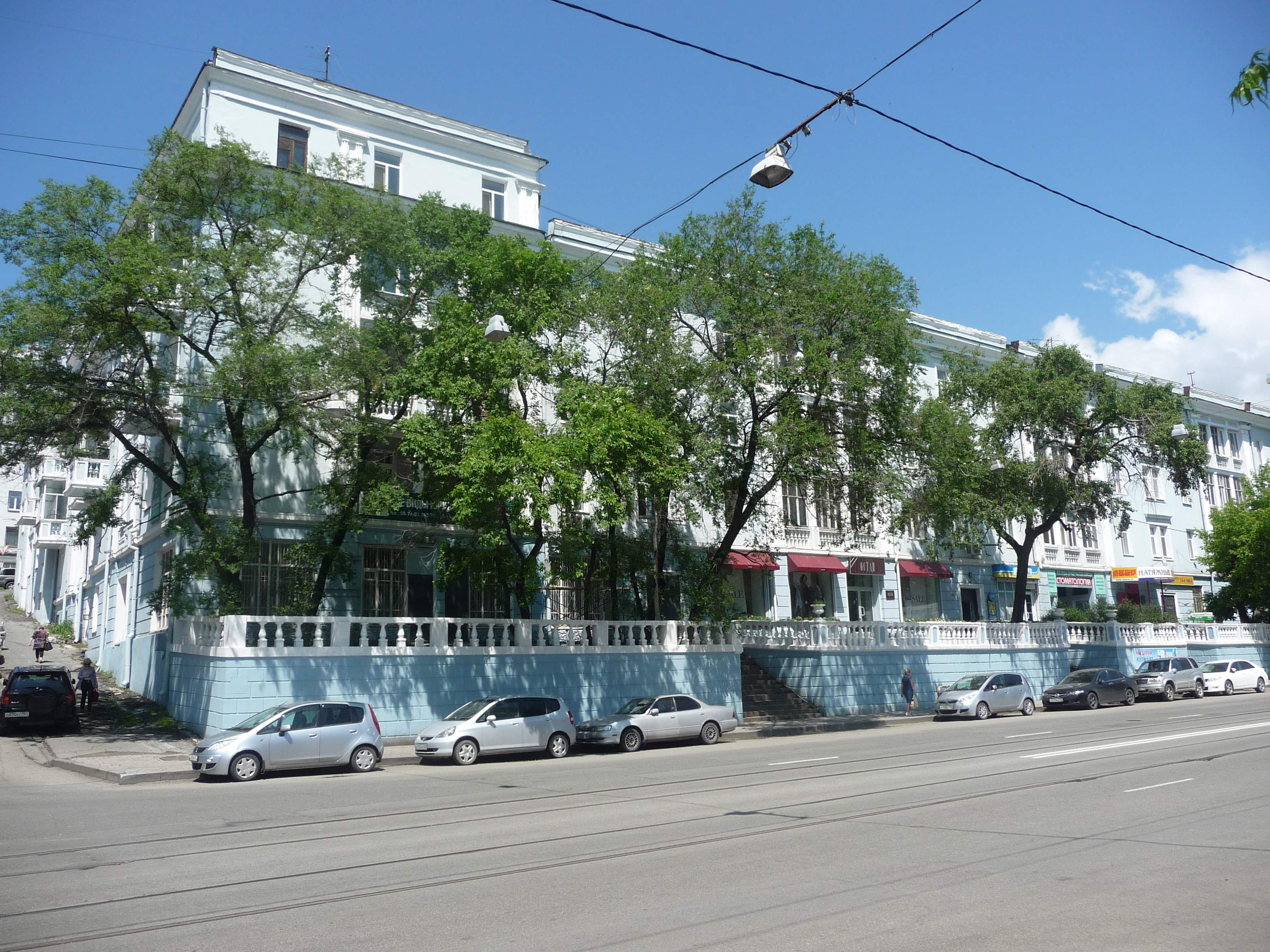 Владивосток, ул. Светланская, 109, 2012-07-05